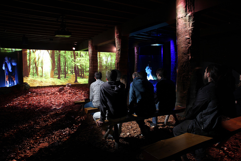 Sala Bandolers